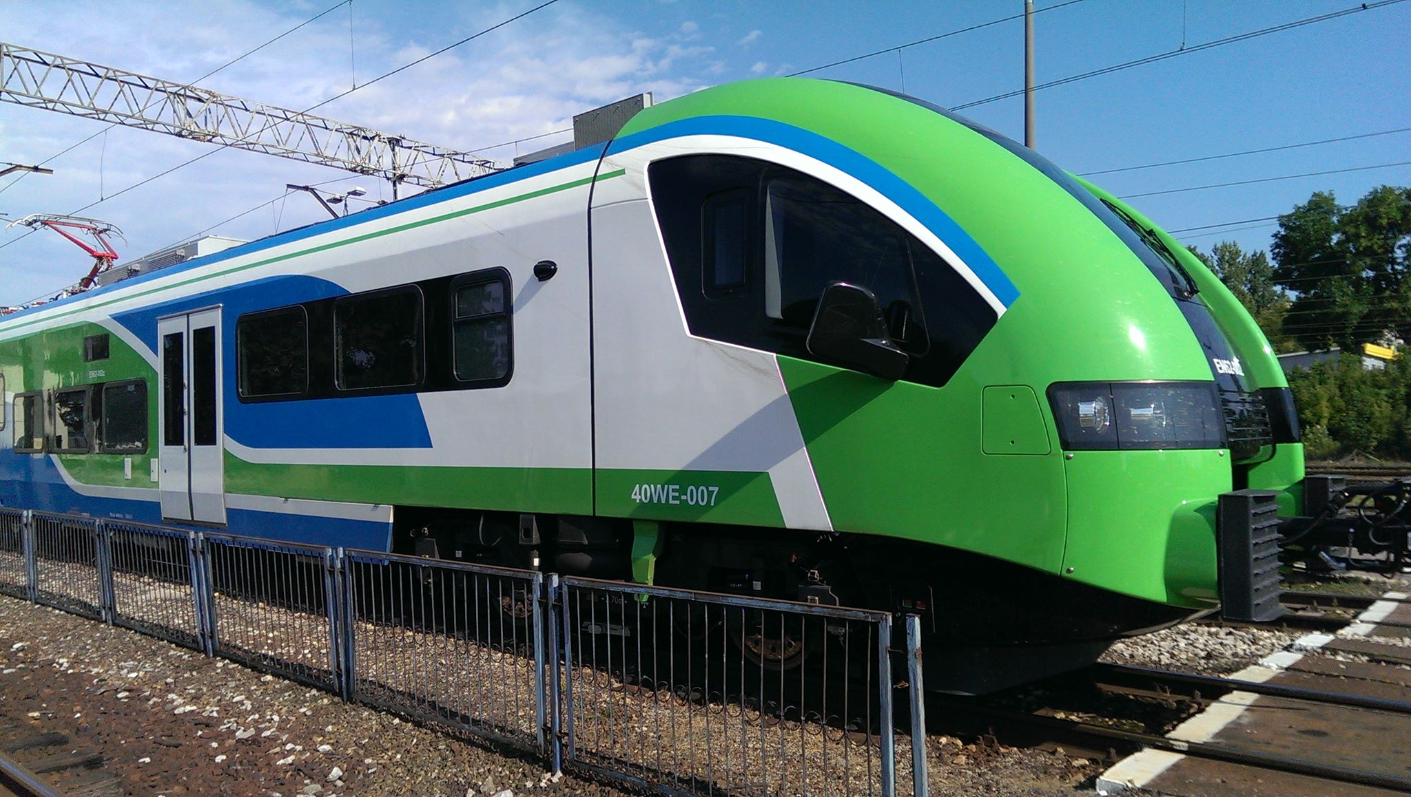 Elektryczny zespół trakcyjny Pesa Acatus Plus EN62-002